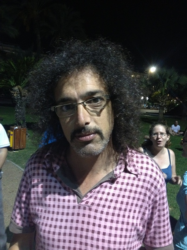 Dror Feuer, Israeli Publicist